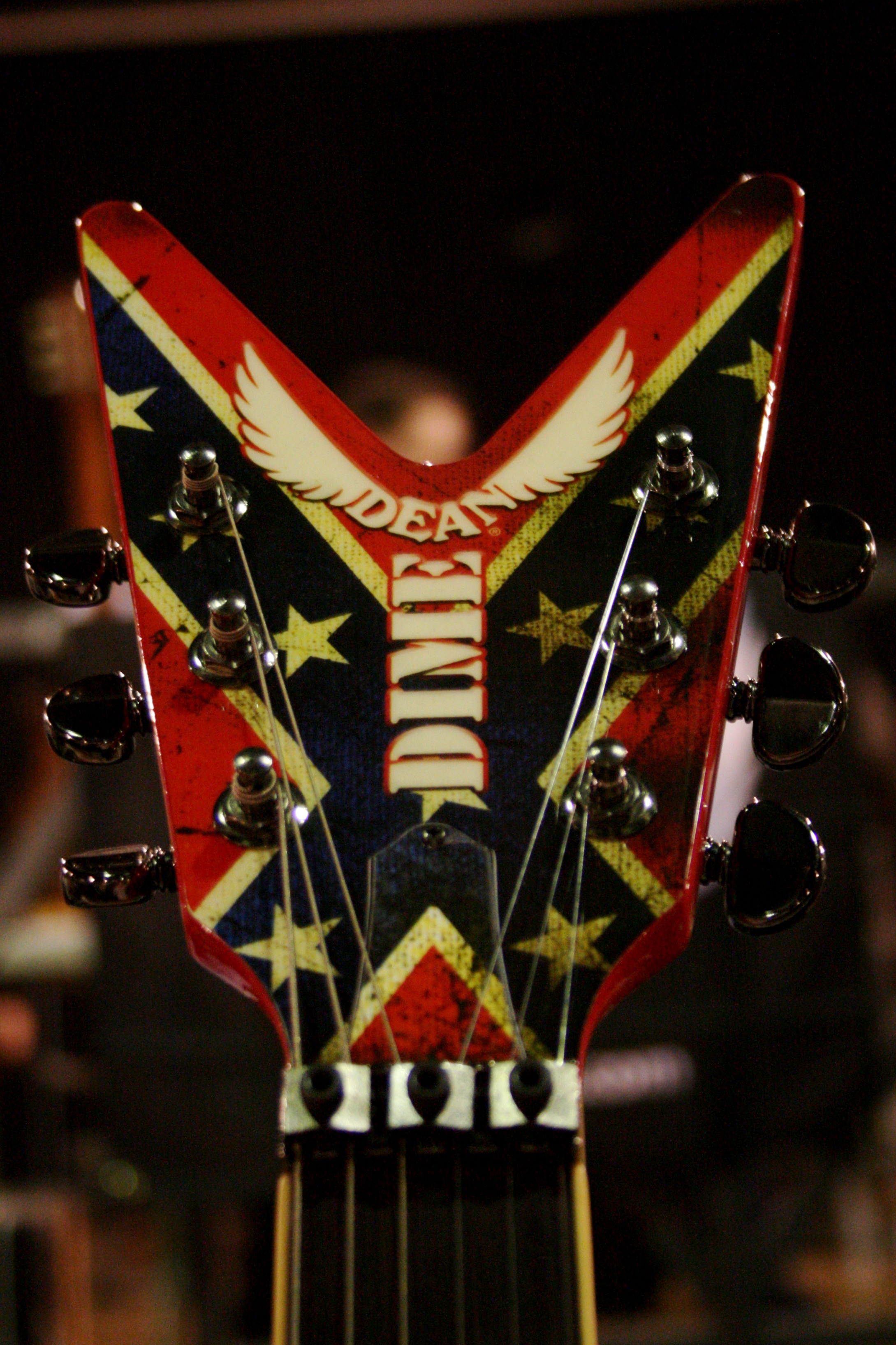 Dean Guitar - "Dimebag" Darrell Abbott - (Pantera) Signature